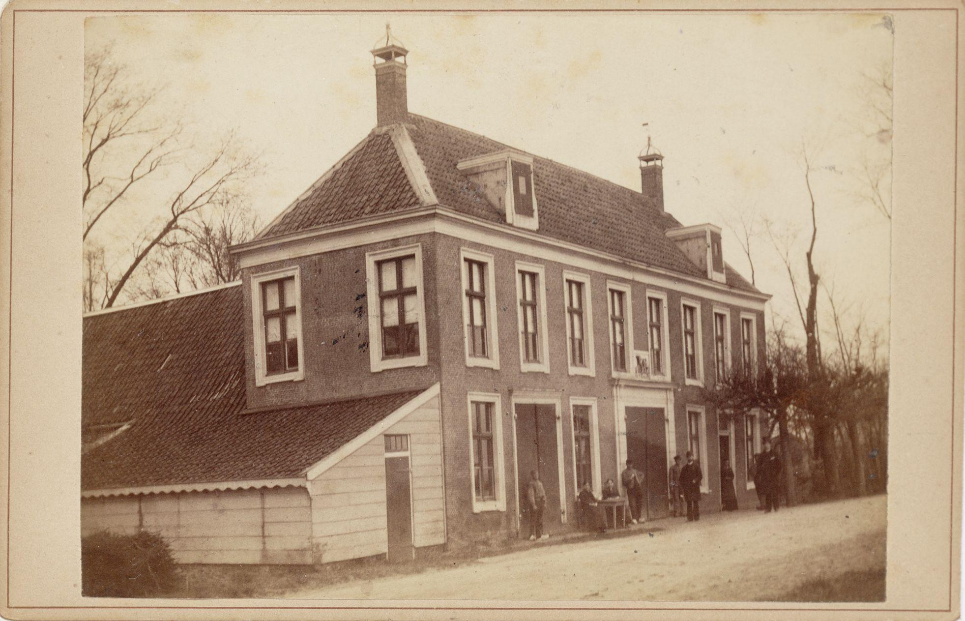 Beschrijving Amsteldijk 354 't Oude Kalfje. Kabinetfoto. Documenttype foto Vervaardiger Reynet de la Rue, P.H.J. Collectie Collectie Stadsarchief Amsterdam: foto-afdrukken Datering 1890 ca. Geografische naam Amsteldijk Inventarissen Afbeeldingsbestand 010003002317 Generated with Dememorixer